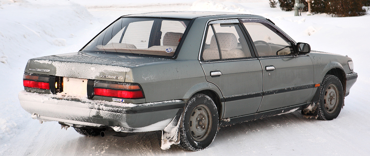 Nissan Bluebird 4door sedan 2.0D XE-Saloon F ( SU12 )